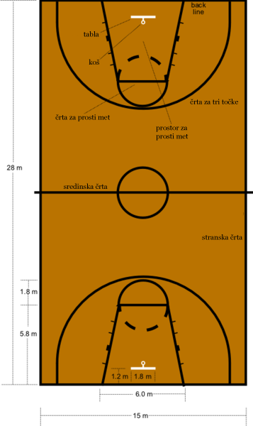 Mere košarkarskega igrišča.